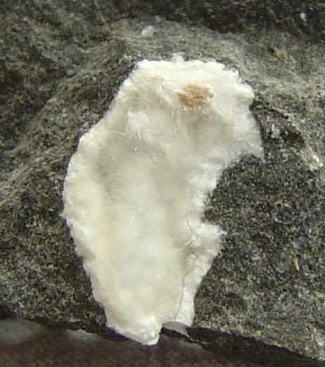 natrolit, pochodzenie Polska, Gracza; autor zdjęcia Dagmara Lesiów; 20.o8.2006r